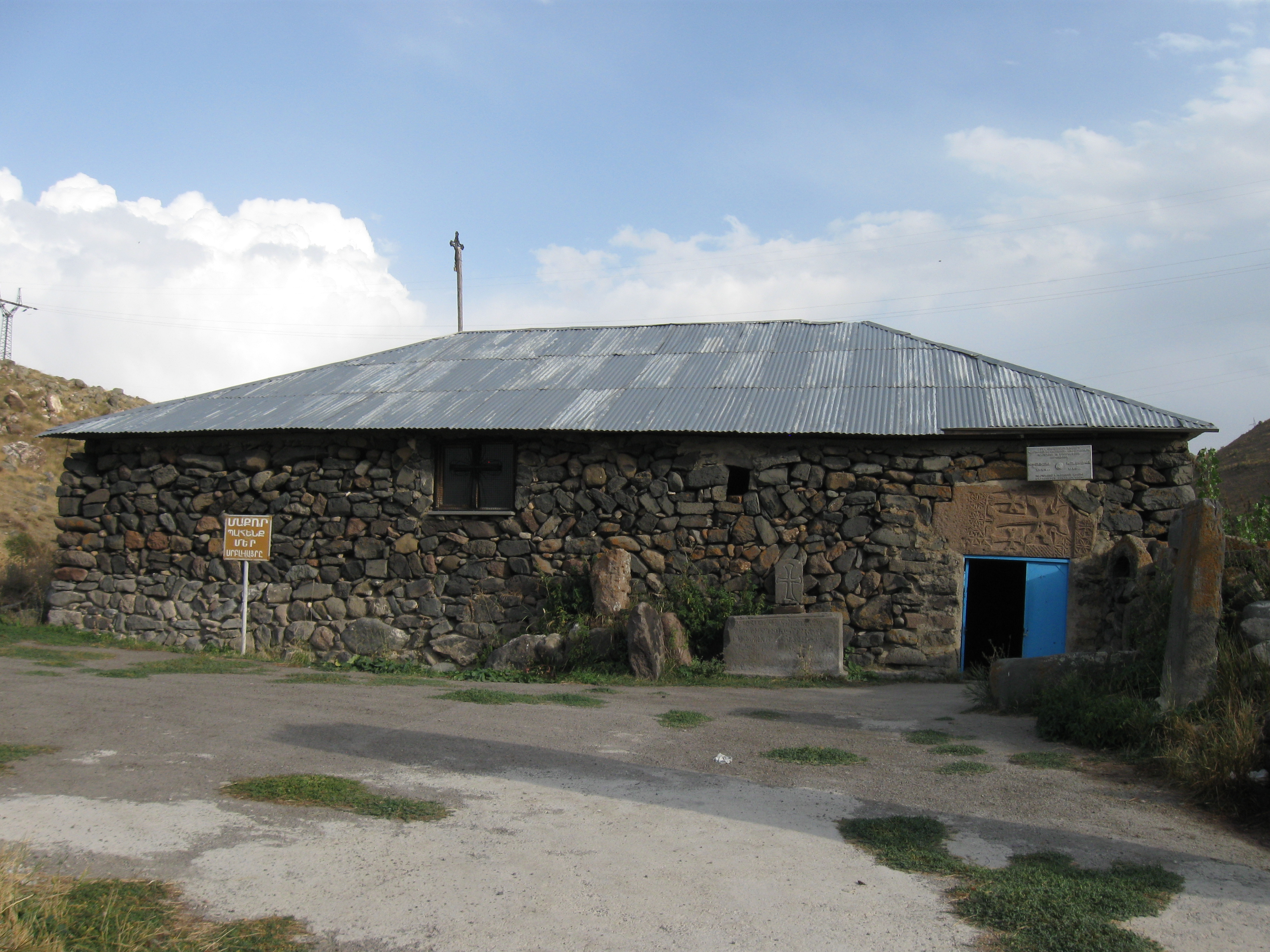 Եկեղեցի «Իշխանավանք», 13 դ. 85/19